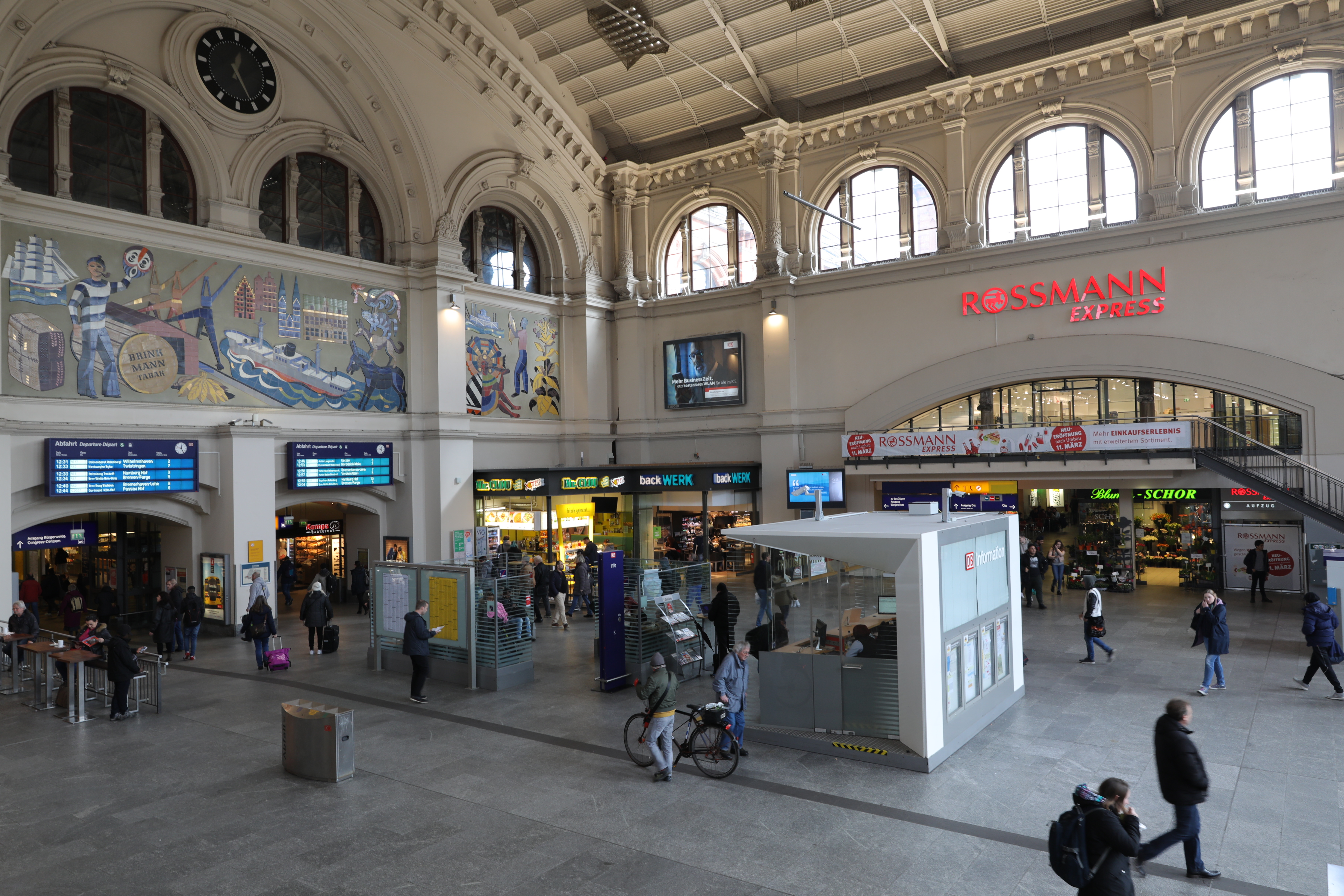 Empfangshalle des Bremer Hauptbahnhofs